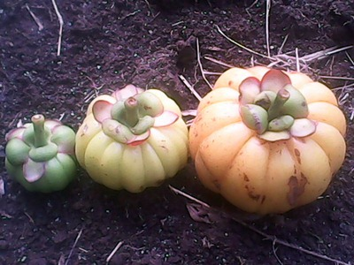 Buah asam gelugur. Putik, buah muda dan buah tua.